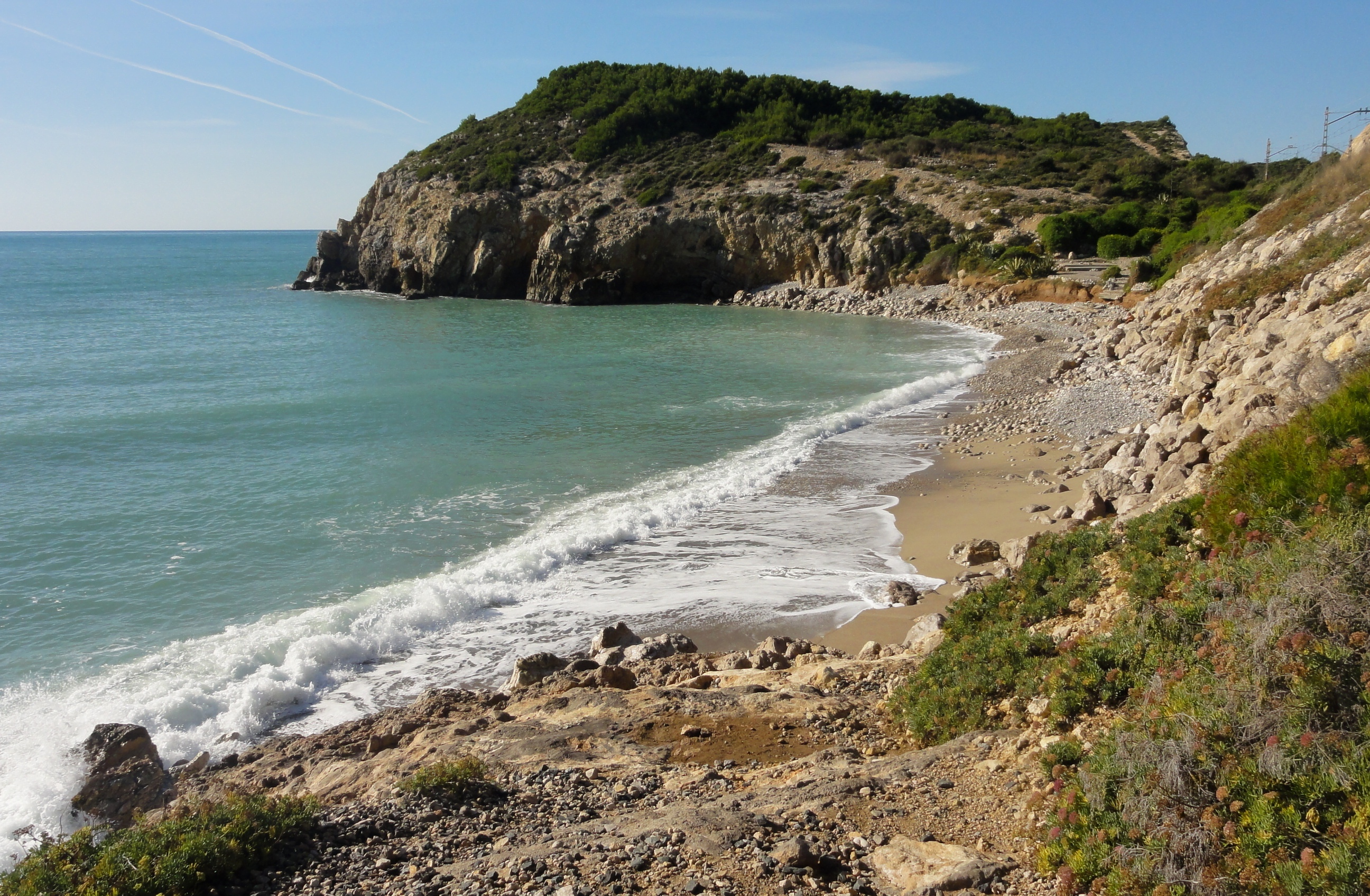 Platja de l'Home Mort (Sitges) This is a a photo of a beach in Catalonia, Spain, with id: PL-CT-17003-302